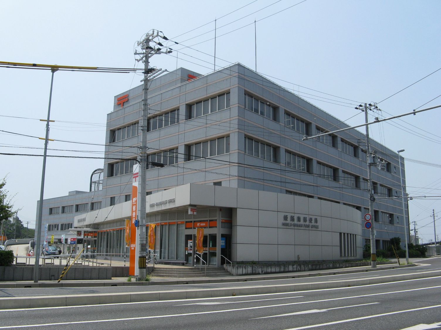 姫路南郵便局